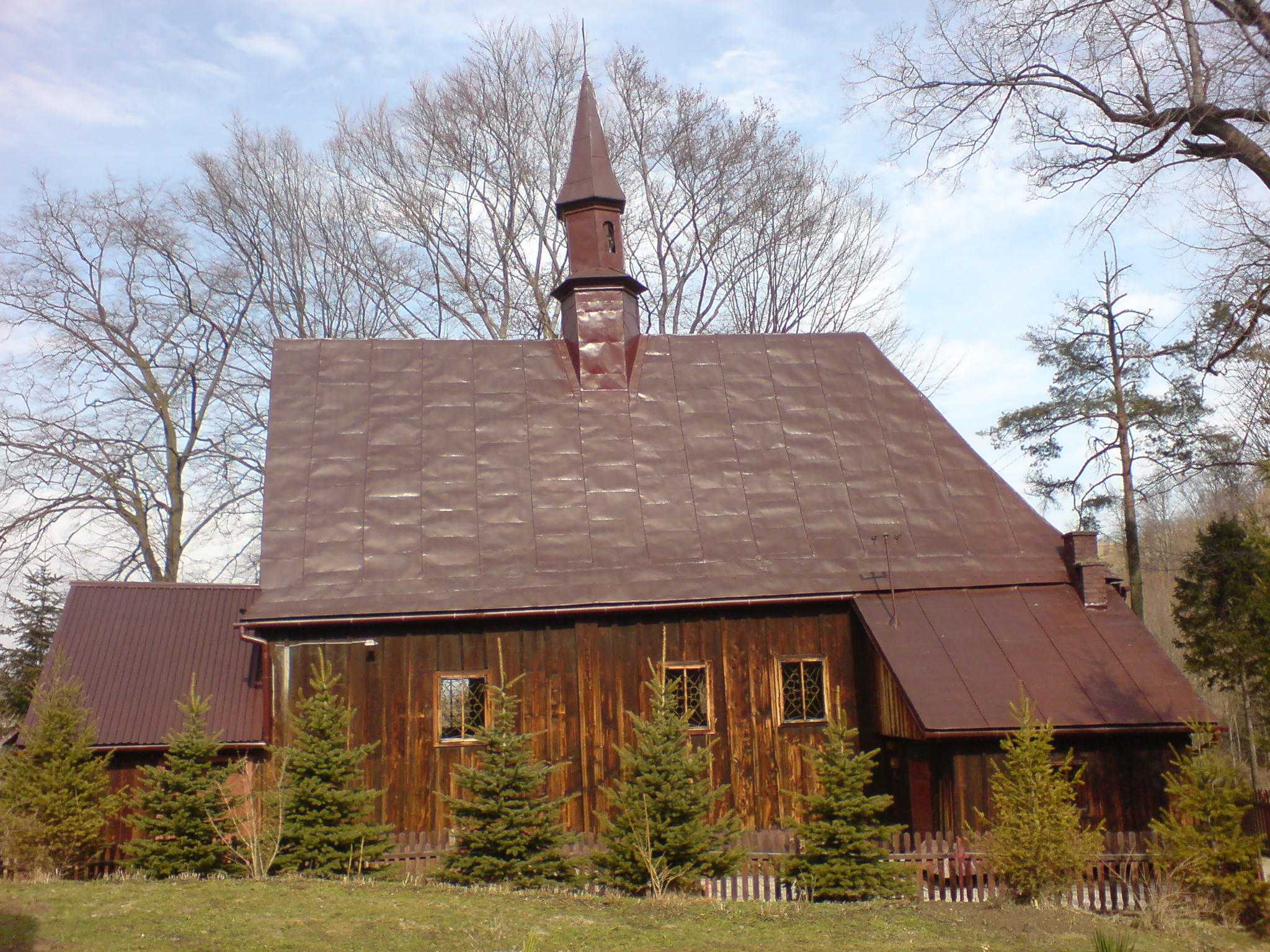 Kościół w Krzywem